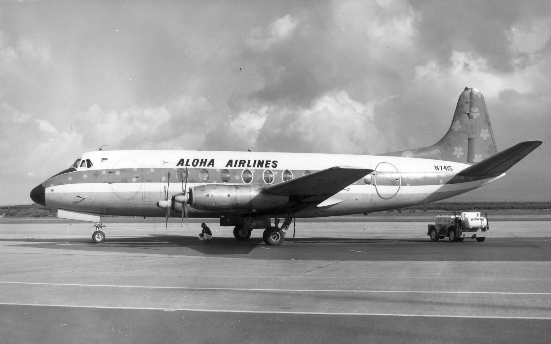 Kahului, Maui, December 26, 1970.